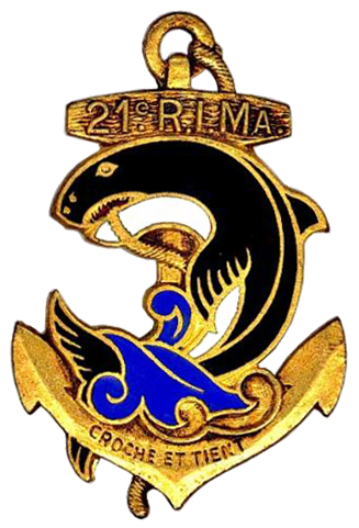 Insigne du 21e régiment d'infanterie de marine (21e RIMa)